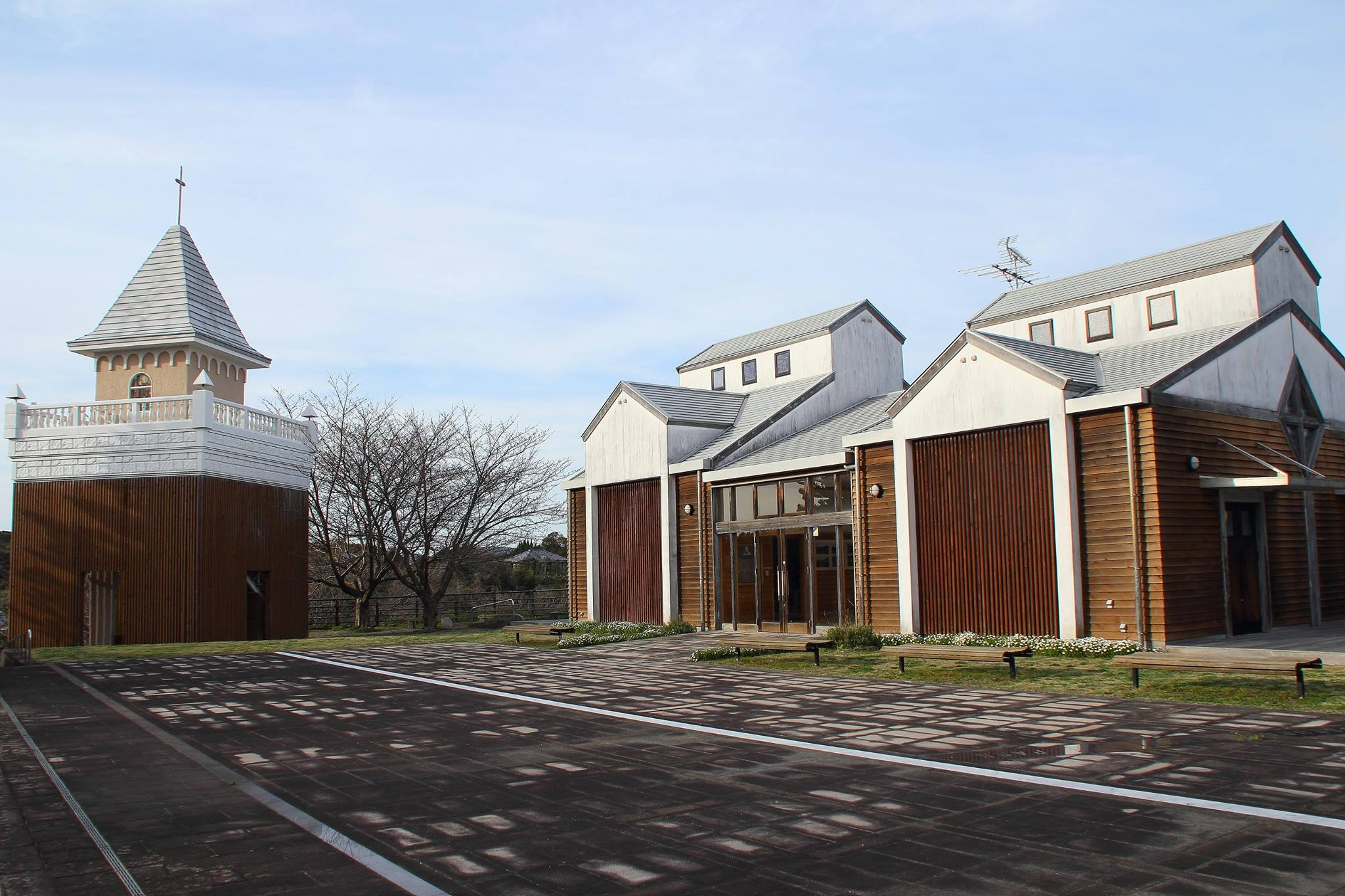 横瀬浦資料館